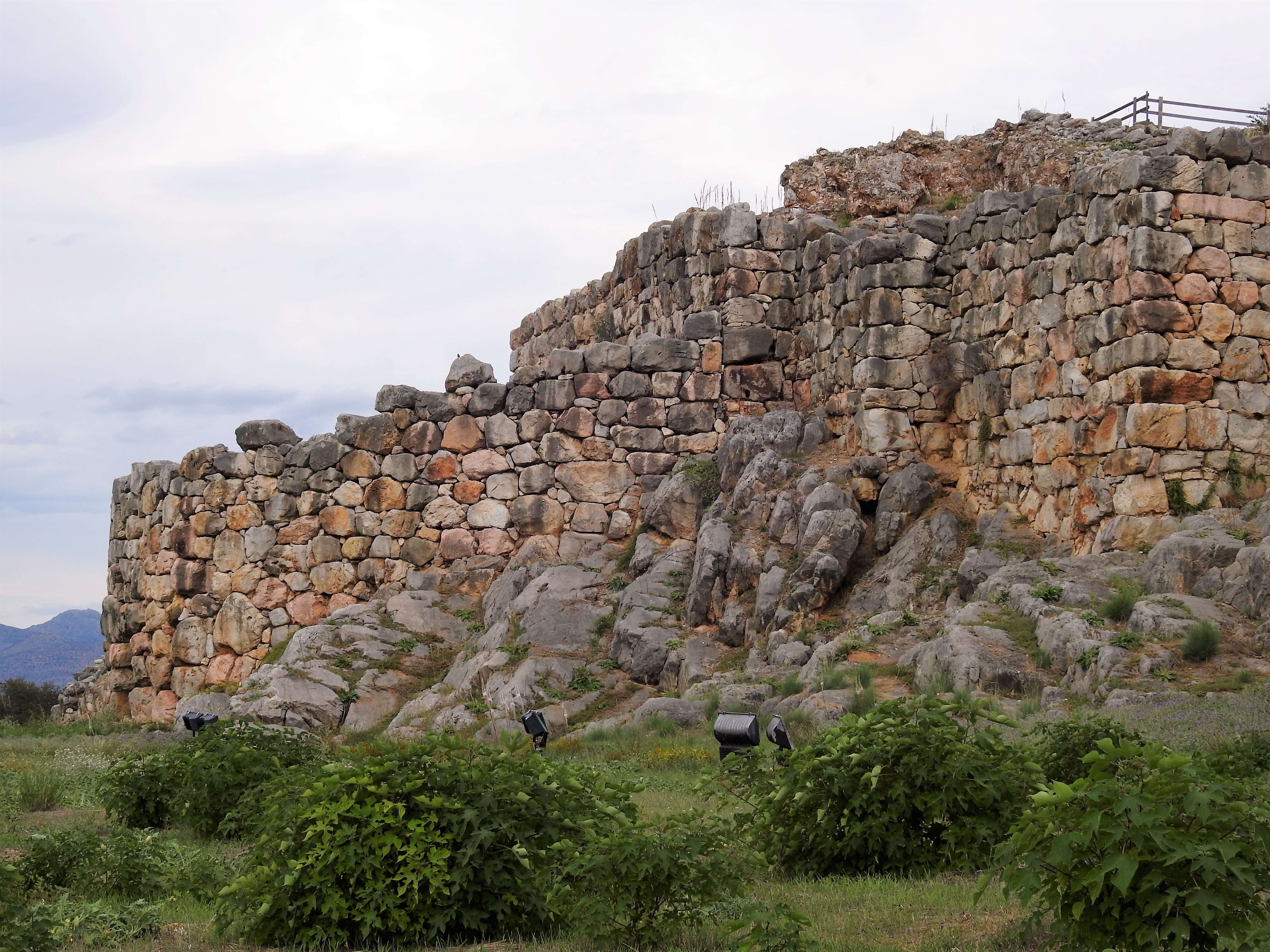 Κάτω Ακρόπολη Τίρυνθας«Κάτω Ακρόπολη Τίρυνθας»